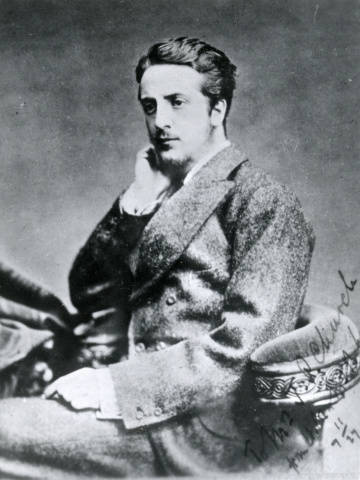 Фотография Джона Танстелла